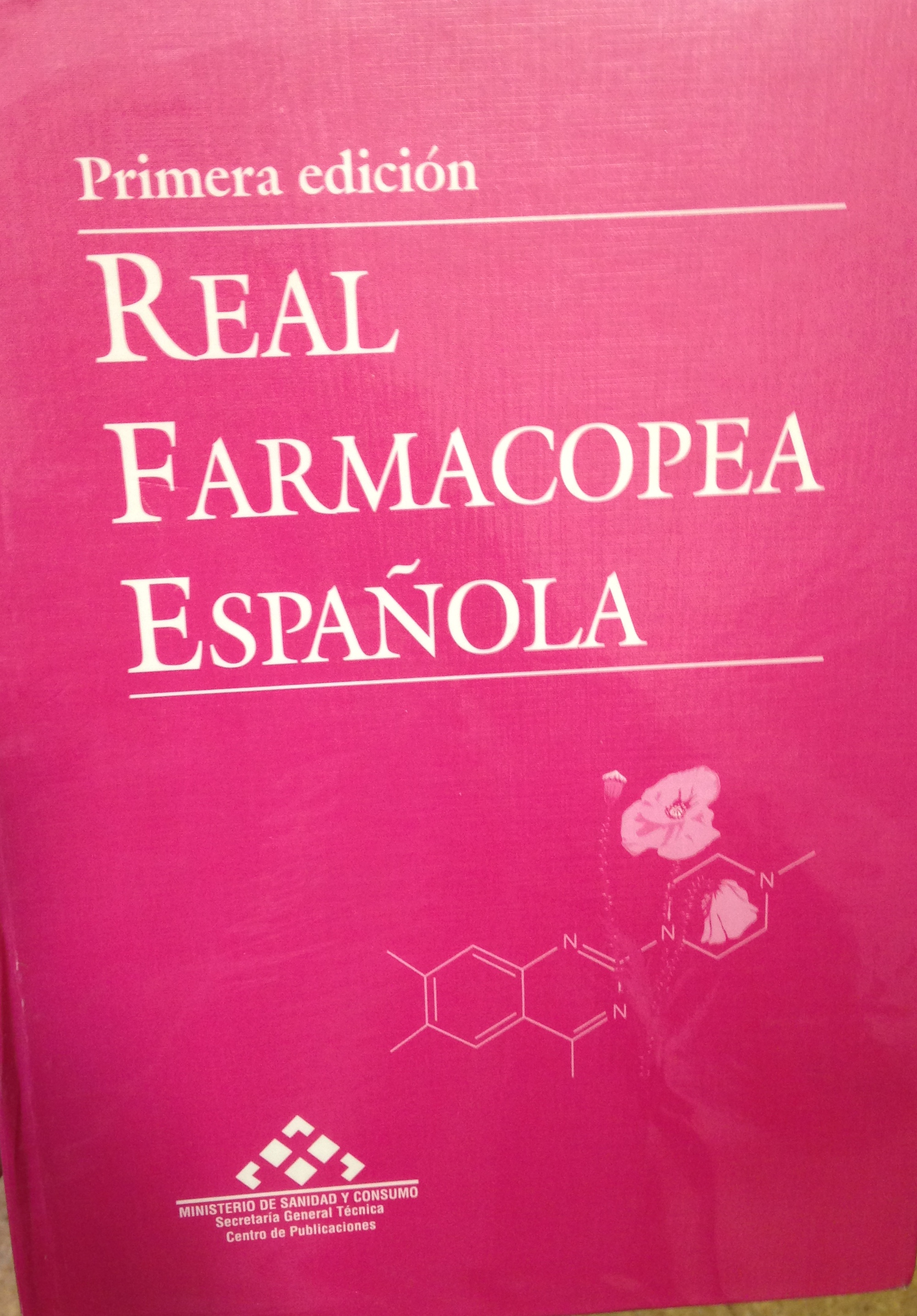 Real Spanish Pharmacopoea's book.